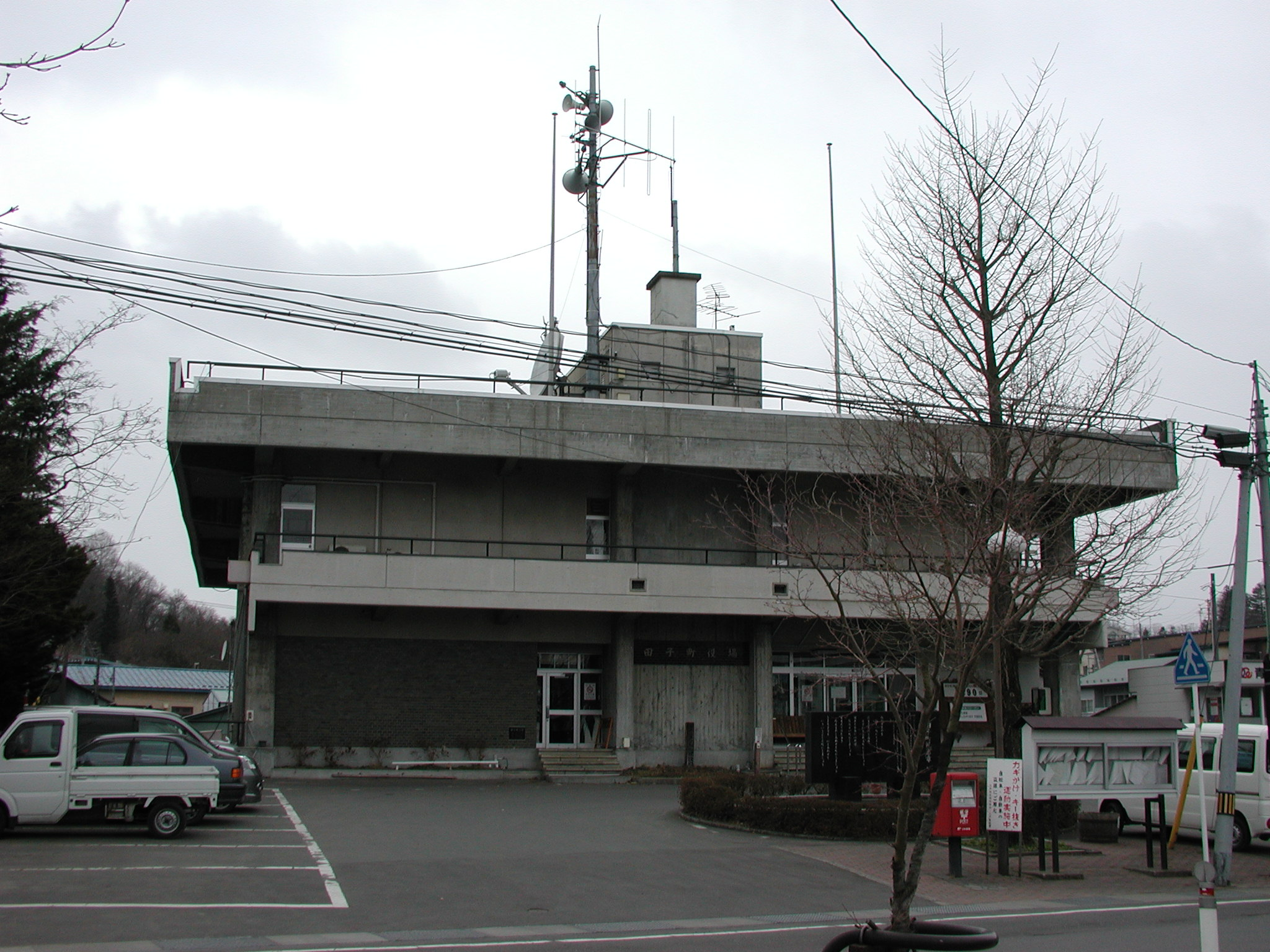 田子町役場 庁舎